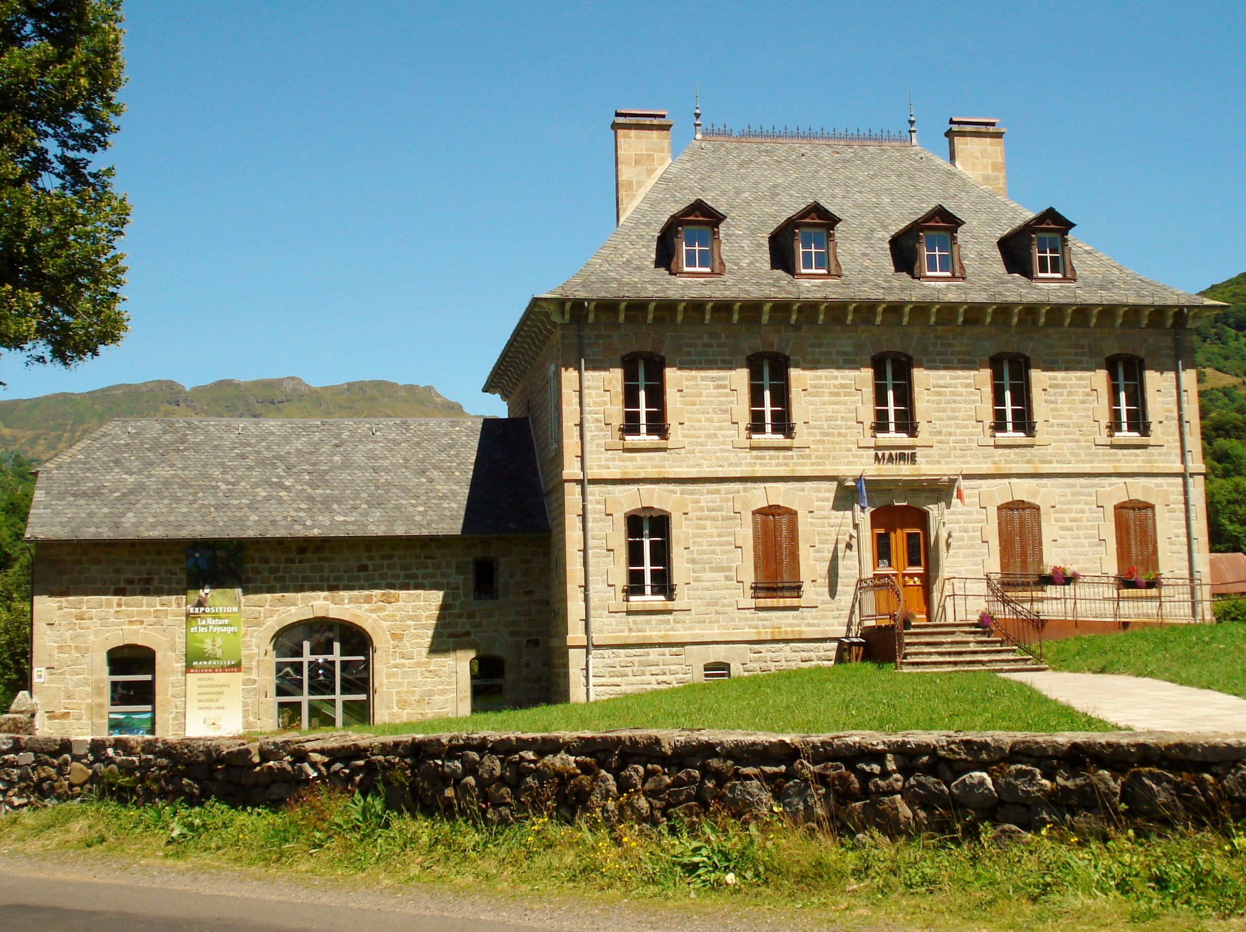 Mairie de Mandailles-Saint-Julien dans le Cantal